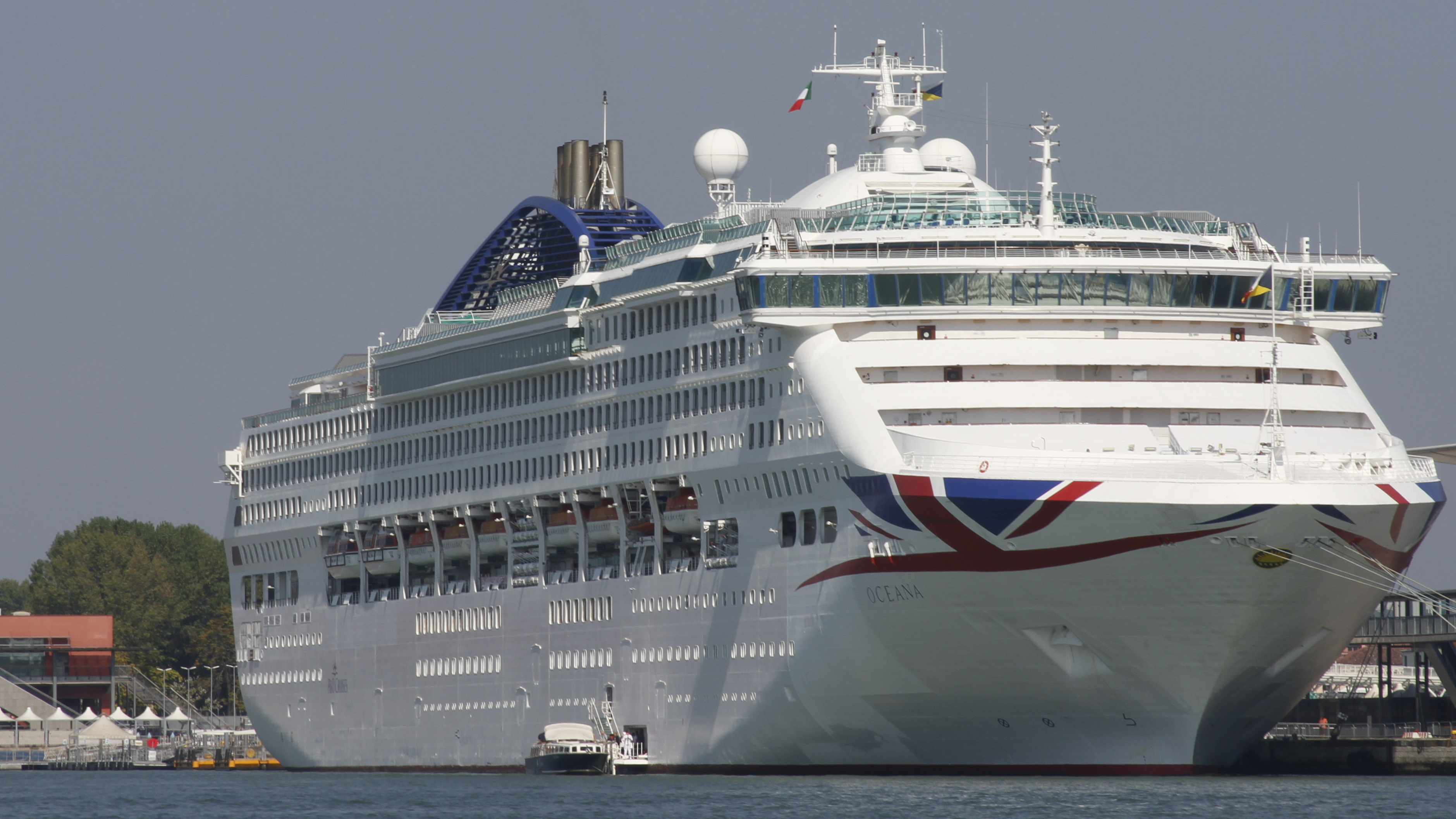 Ship Oceana (2000) in September 2016 in Venice